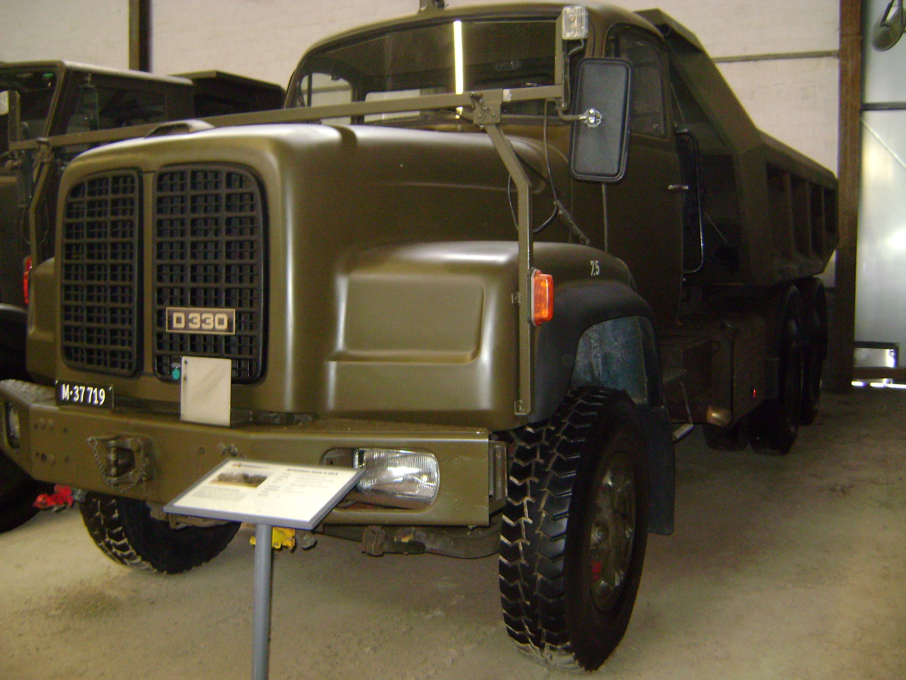 saurerD330N Kipper